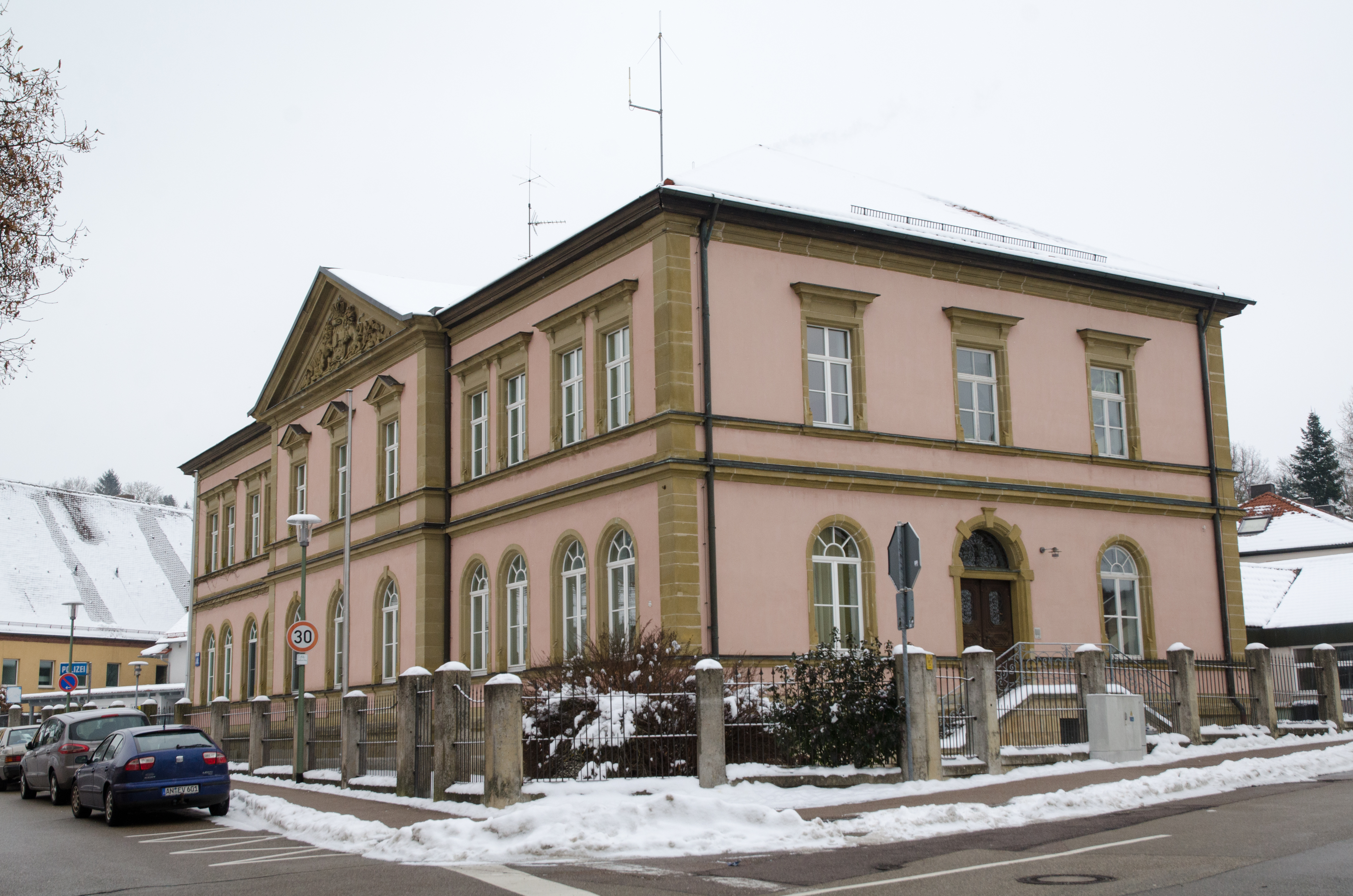 Feuchtwangen, Ringstraße 72